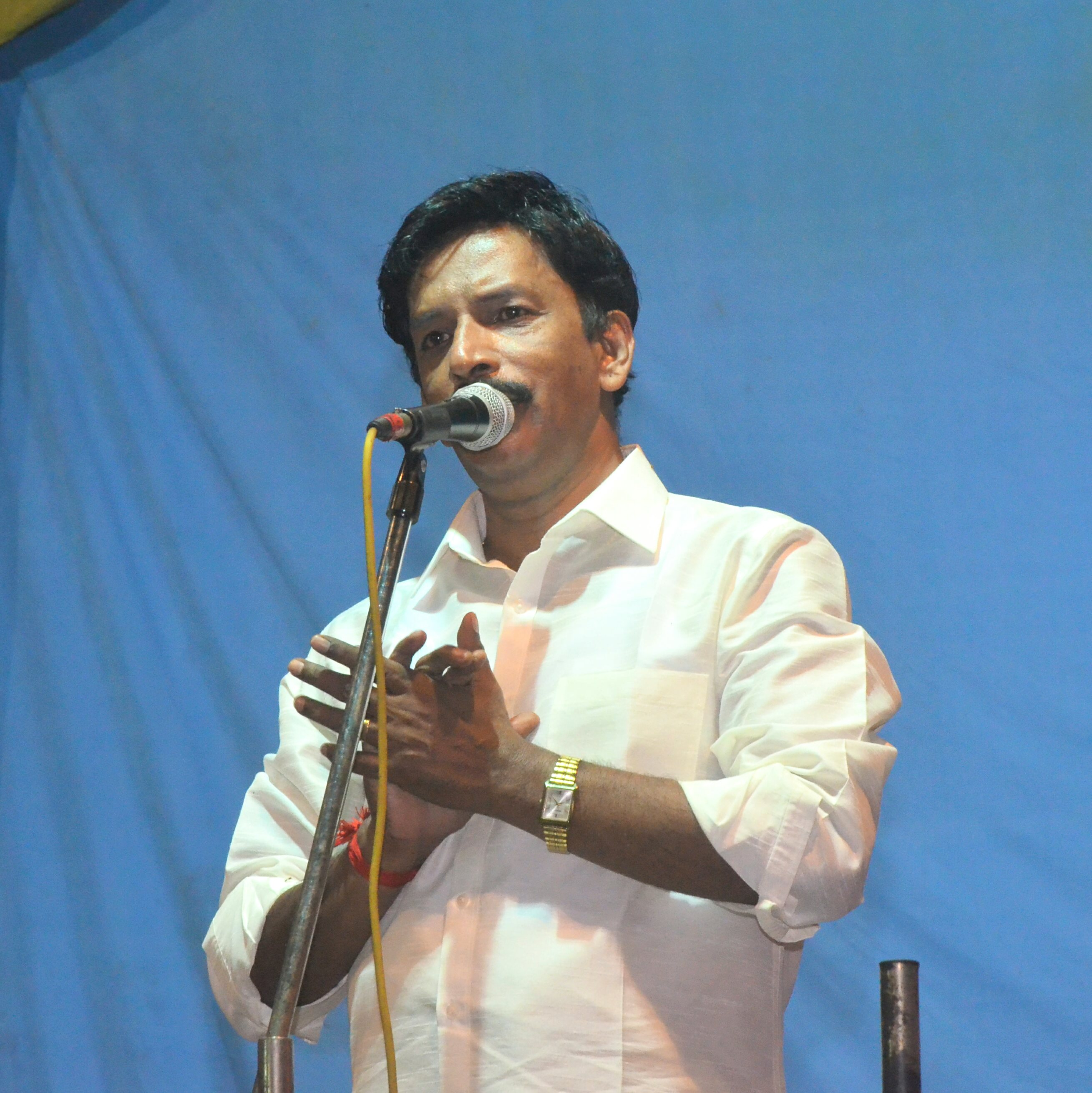 കഥാപ്രസംഗം